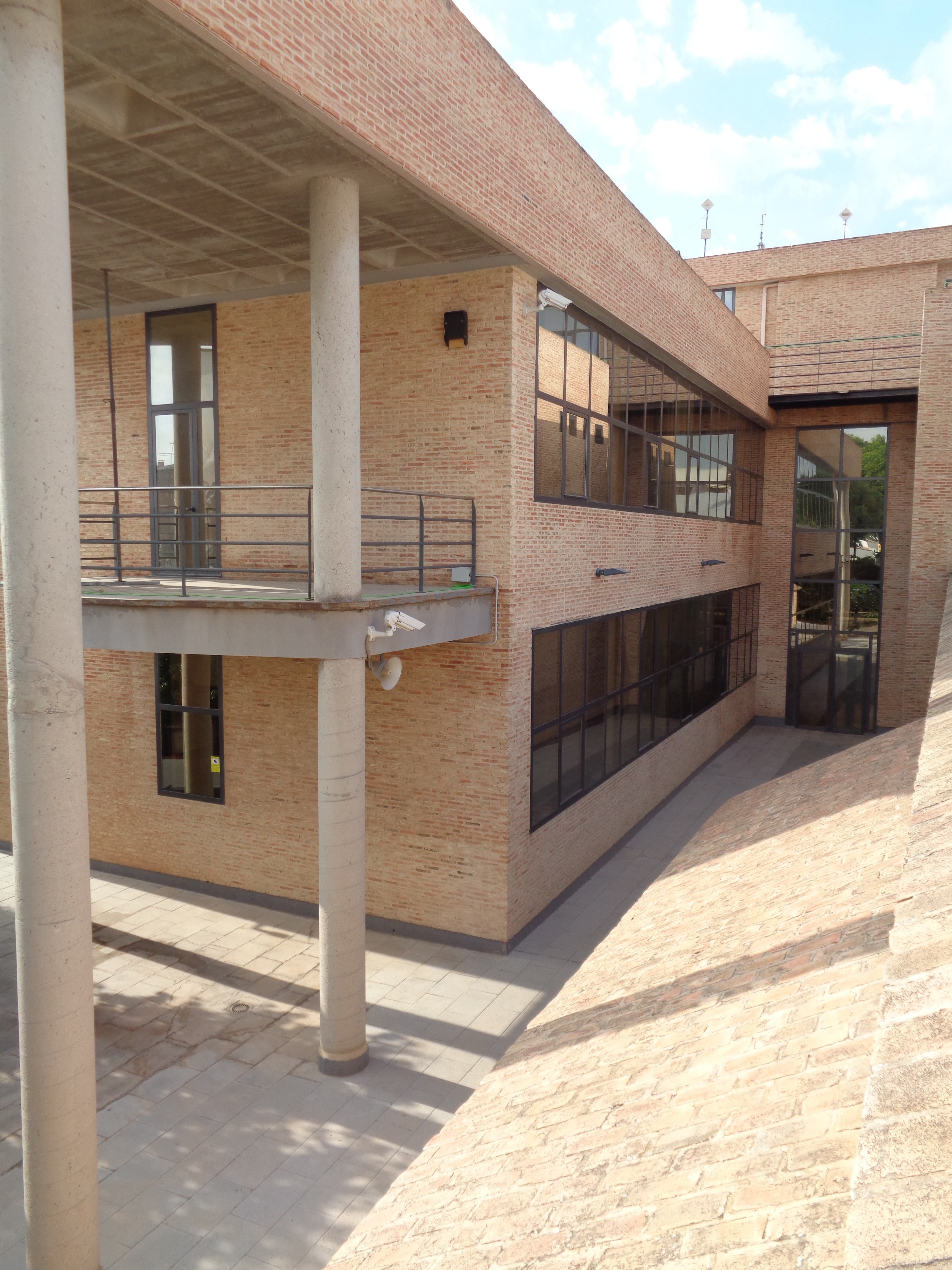 Palau dels Comtes de Villapaterna.